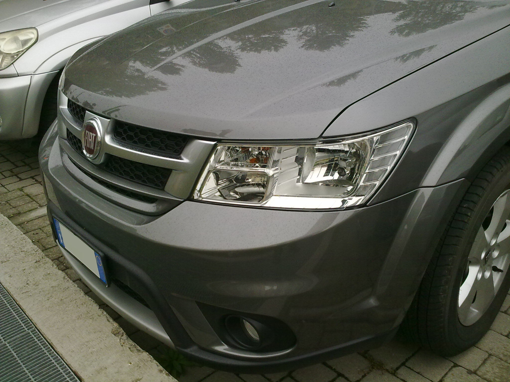 Particolare del gruppo ottico anteriore del nuovo Fiat Freemont